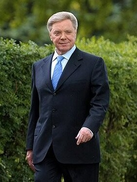 Президент России Дмитрий Медведев (в центре) с губернатором Московской области Борисом Громовым (справа) и директором детского оздоровительного комплекса «Левково» Александром Рыжковым в детском оздоровительном комплексе «Левково».